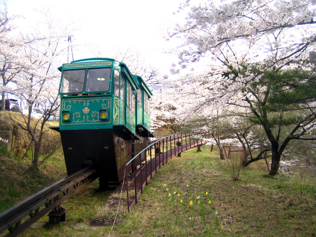 Slope-car in Funaoka castle park.